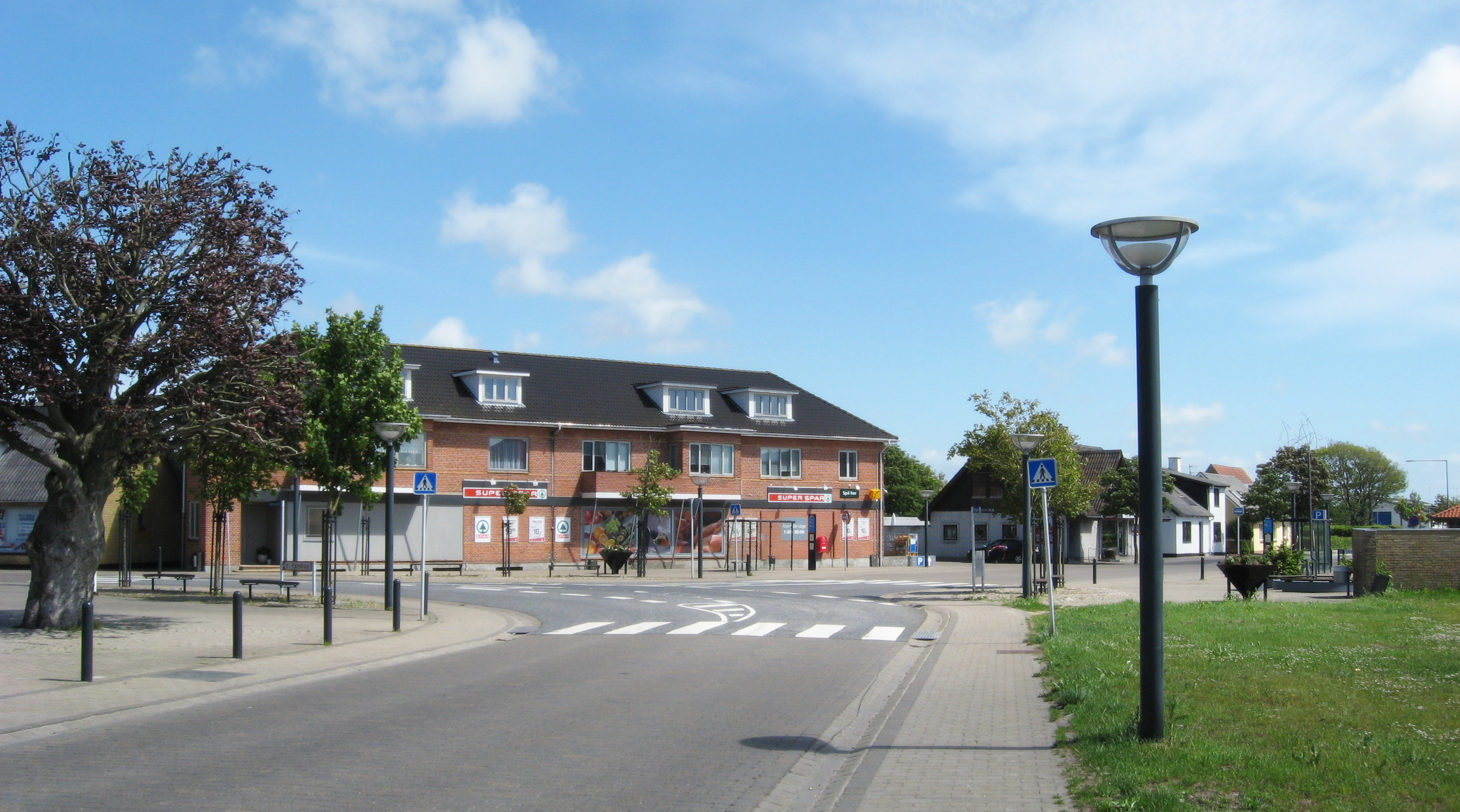 Kås, Jammerbugt Kommune